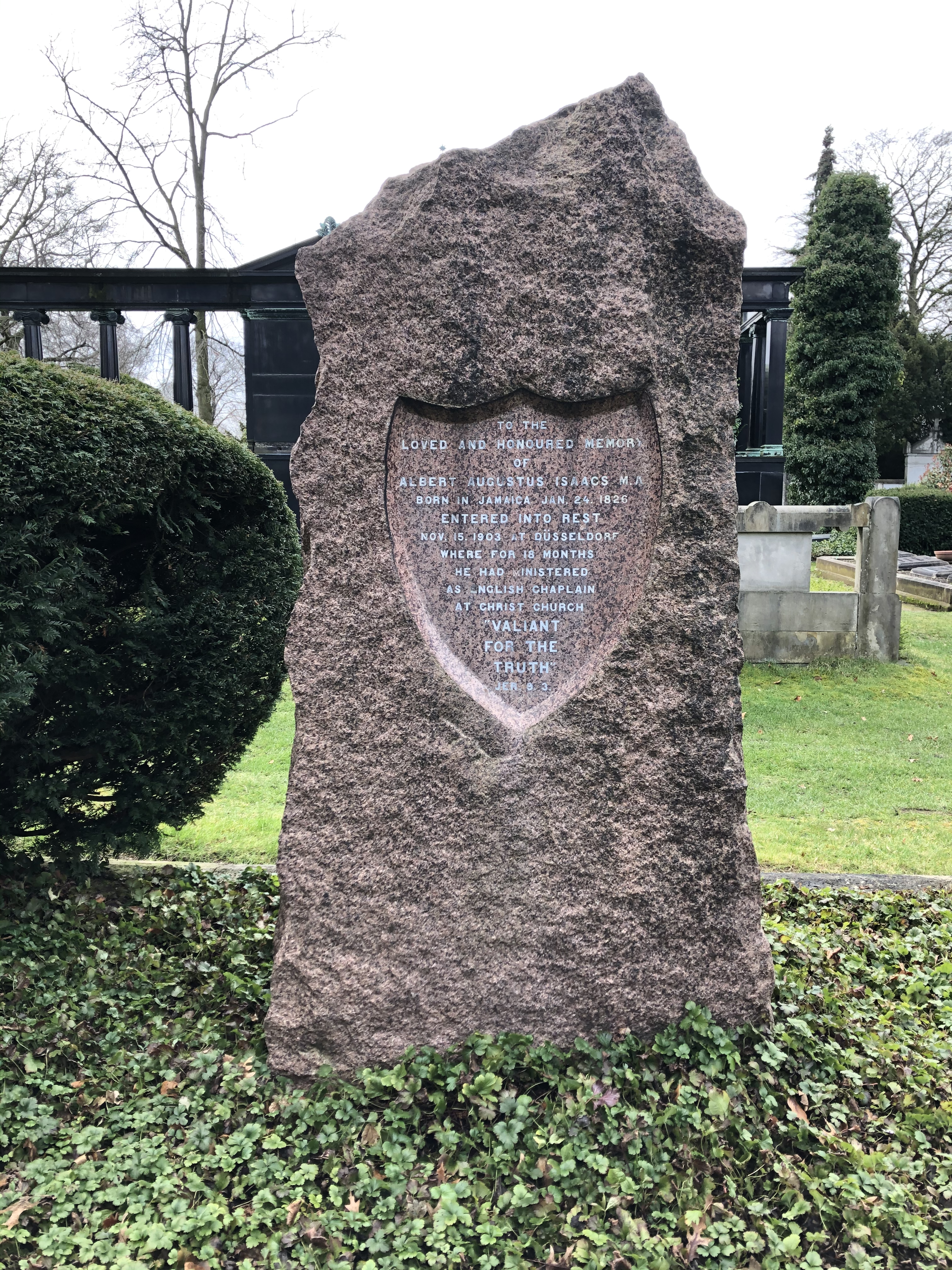 To the loved honored memory of Albert August Isaacs M.A. born in Jamaica Jan. 24. 1826 entered into rest Nov. 15. 1903 at Düsseldorf where for 18 months he had ministered as english chaplain at Christ Church.